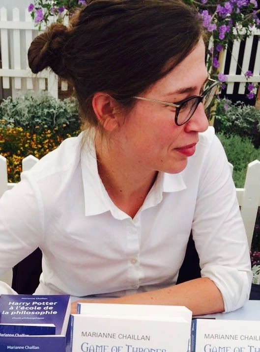 L'auteure Marianne Chaillan en séance de dédicaces à Morges en 2016.